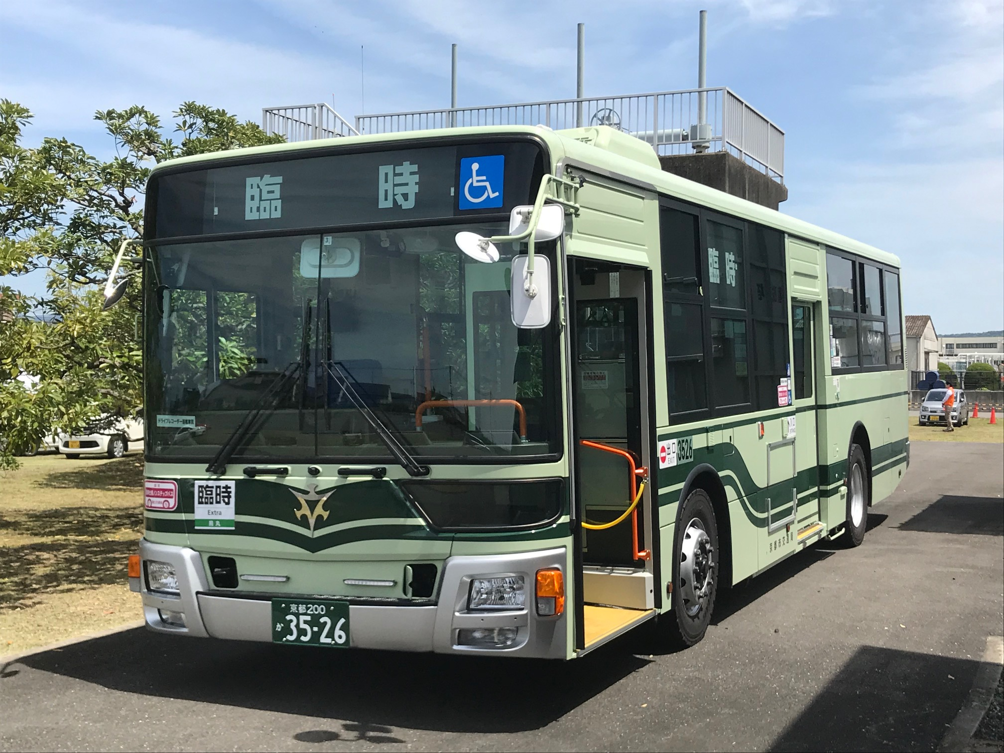 烏丸3526